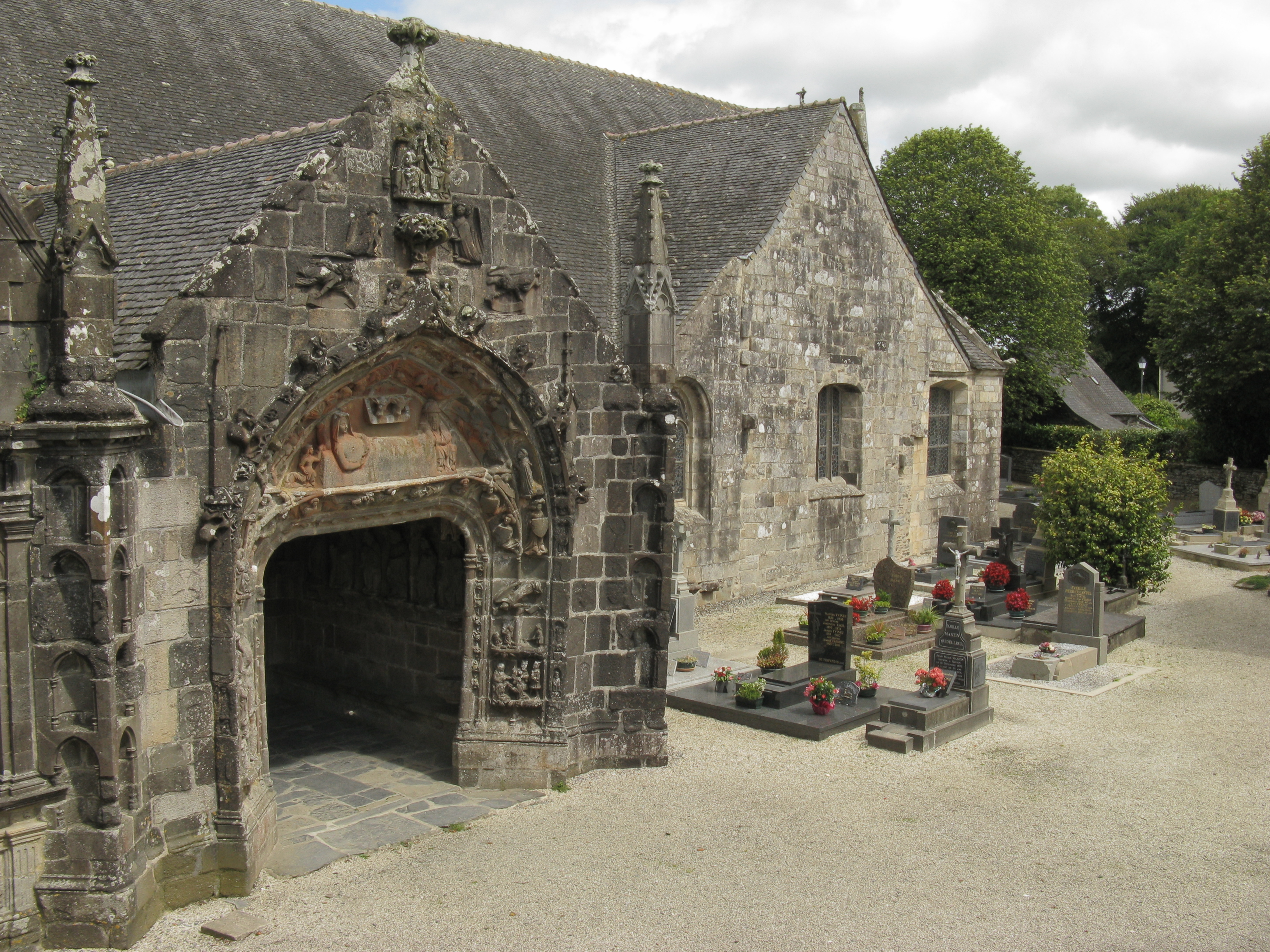 Kerk van La Martyre, Bretagne